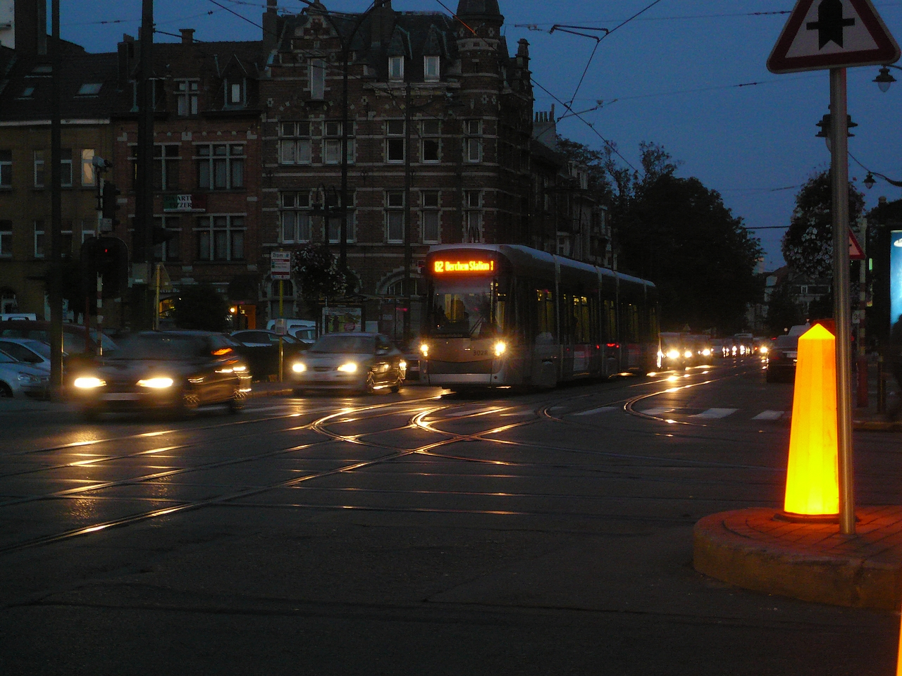 Tramway de Bruxelles - La motrice 3028 sur la ligne 82 à Schweitzer vers Berchem Station.